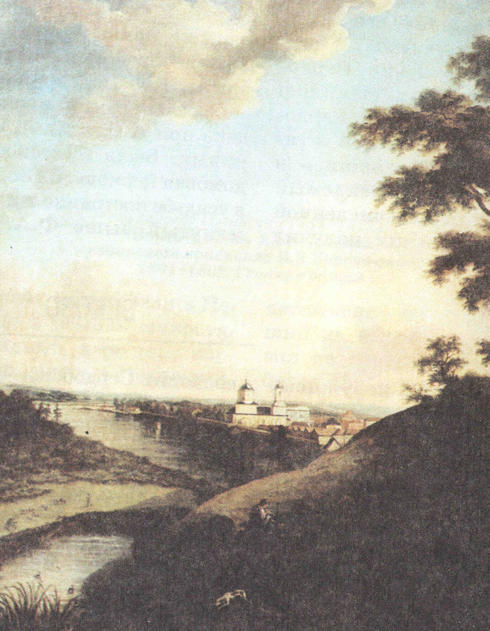 иллюстрация